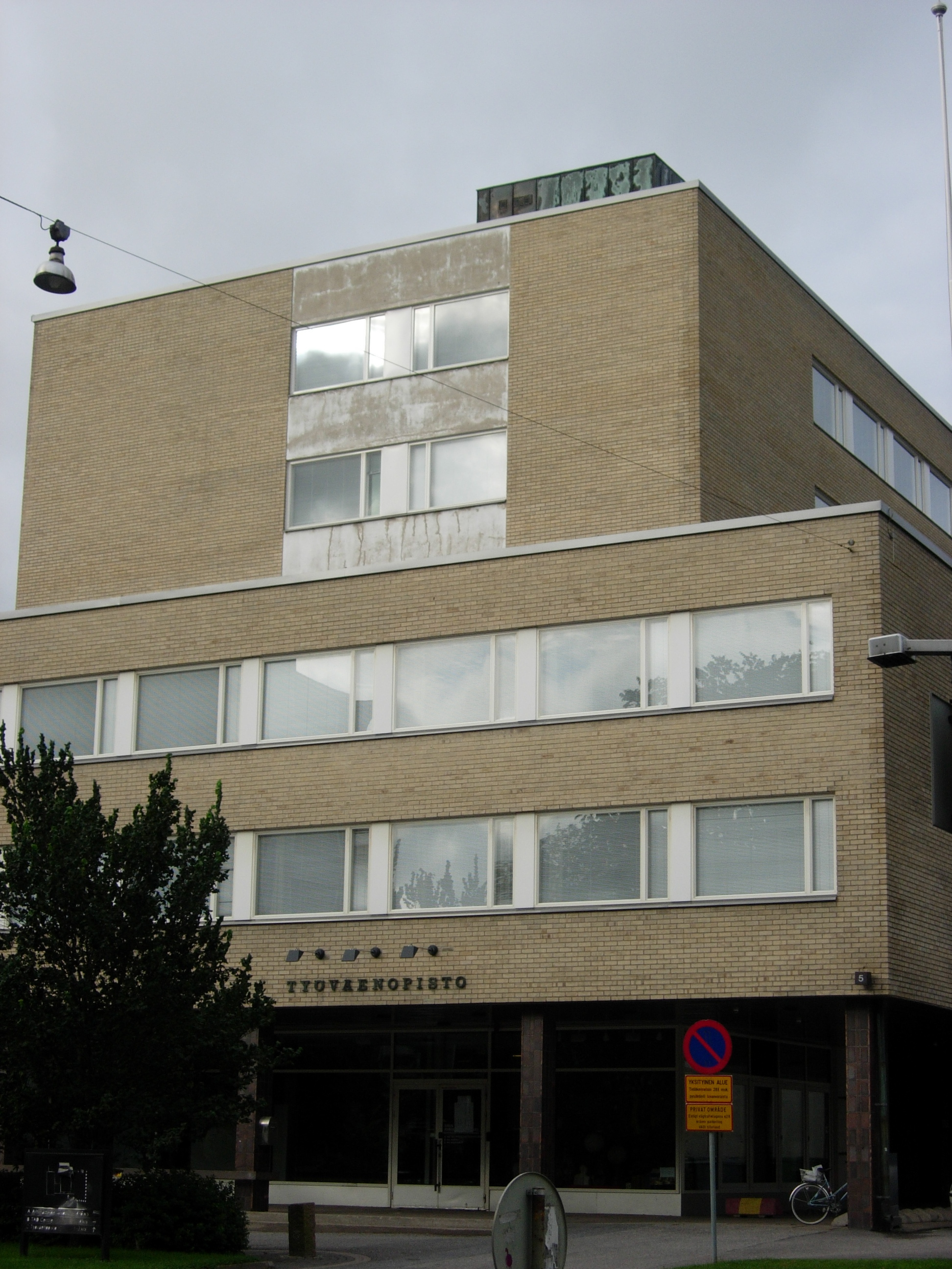 Turun työväenopisto, Kaskenkatu 5, Turku.